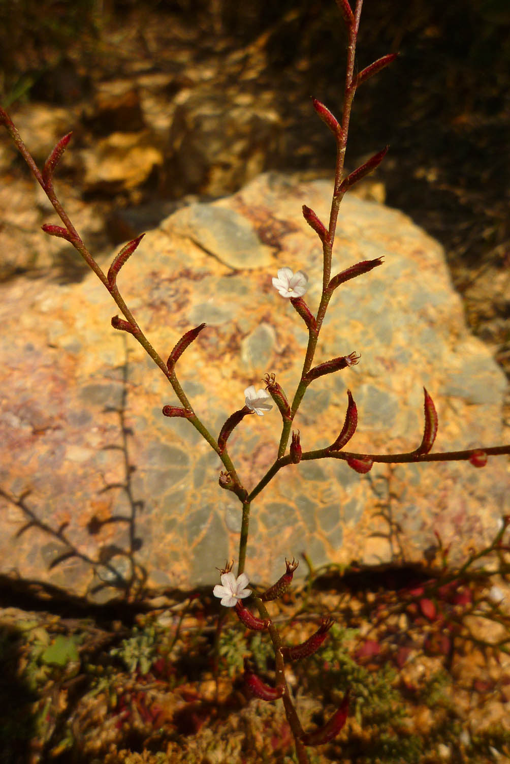 Limonium echioides en el Monte Roldán, Cartagena, España.